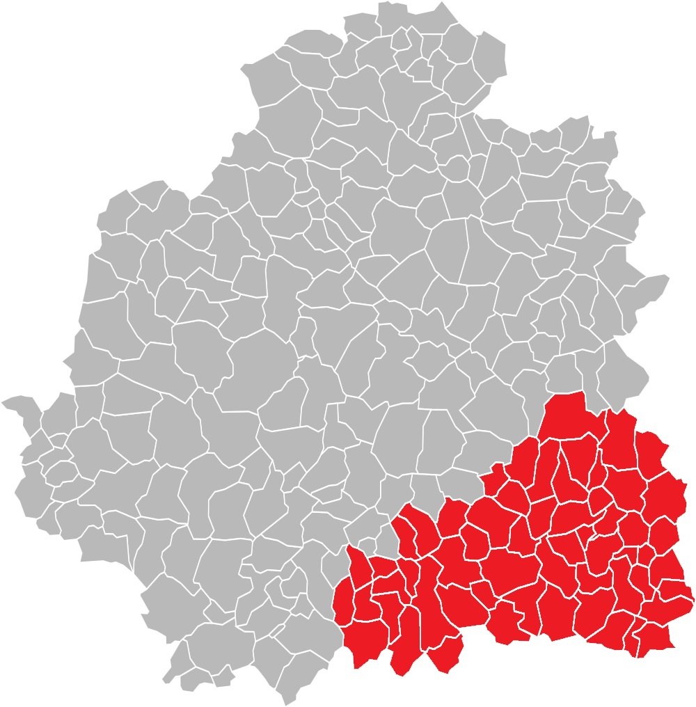 Carte des communes de l'Indre (36) : Arrondissement de La Châtre avant 2015.